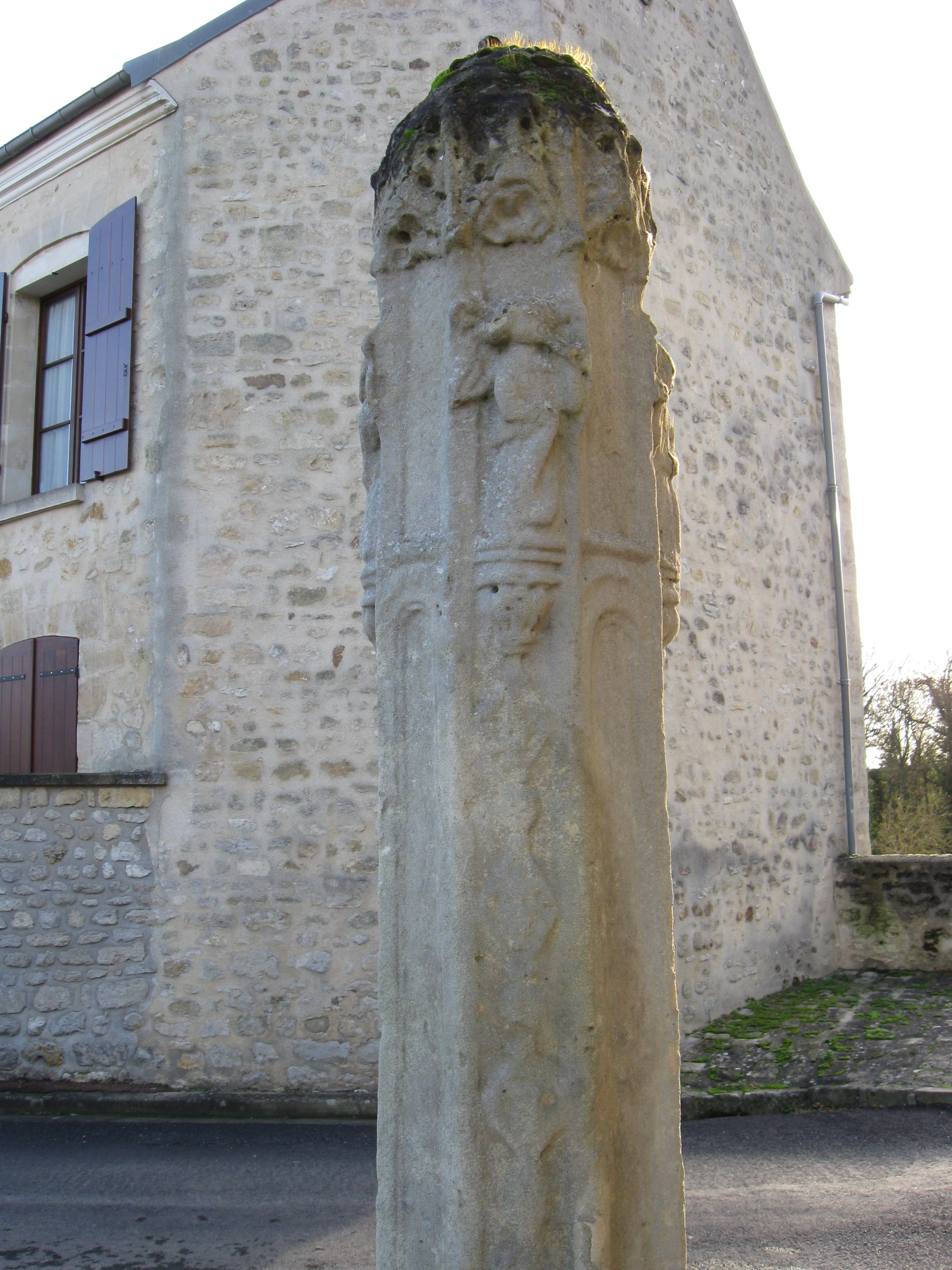 Fût octogonal de la croix (disparue) de l'ancien cimetière face à l'église. (Le Perchay, département du Val-d'Oise, région Île-de-France).